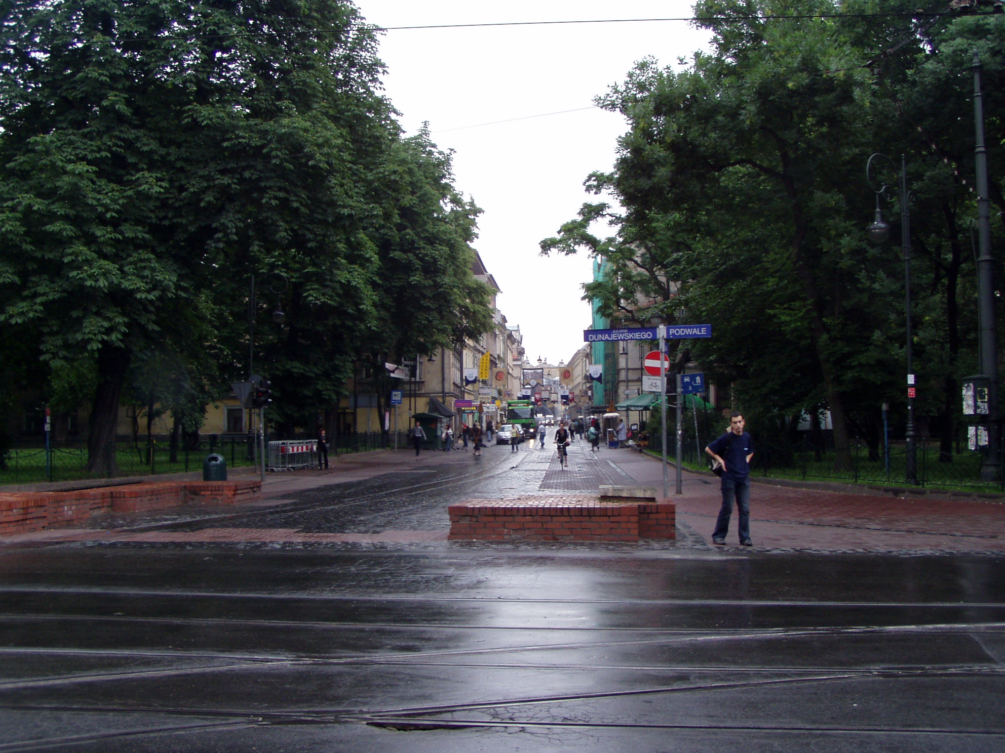 Začiatok Szewskej ulice z Hlavného námestia.